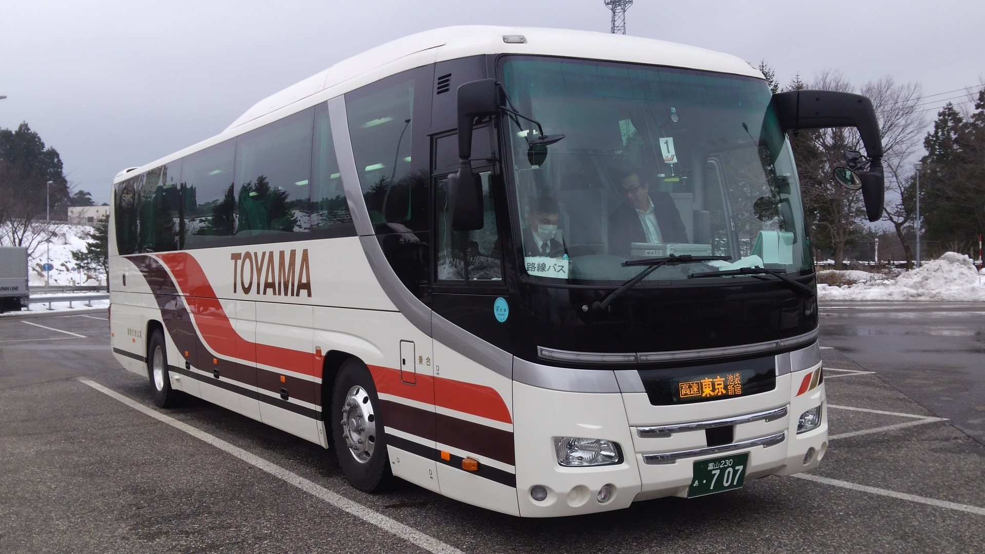 富山地方鉄道の富山～池袋・新宿線など中長距離路線で使用されるセレガ3列シート車。蓮台寺PAで休憩中。